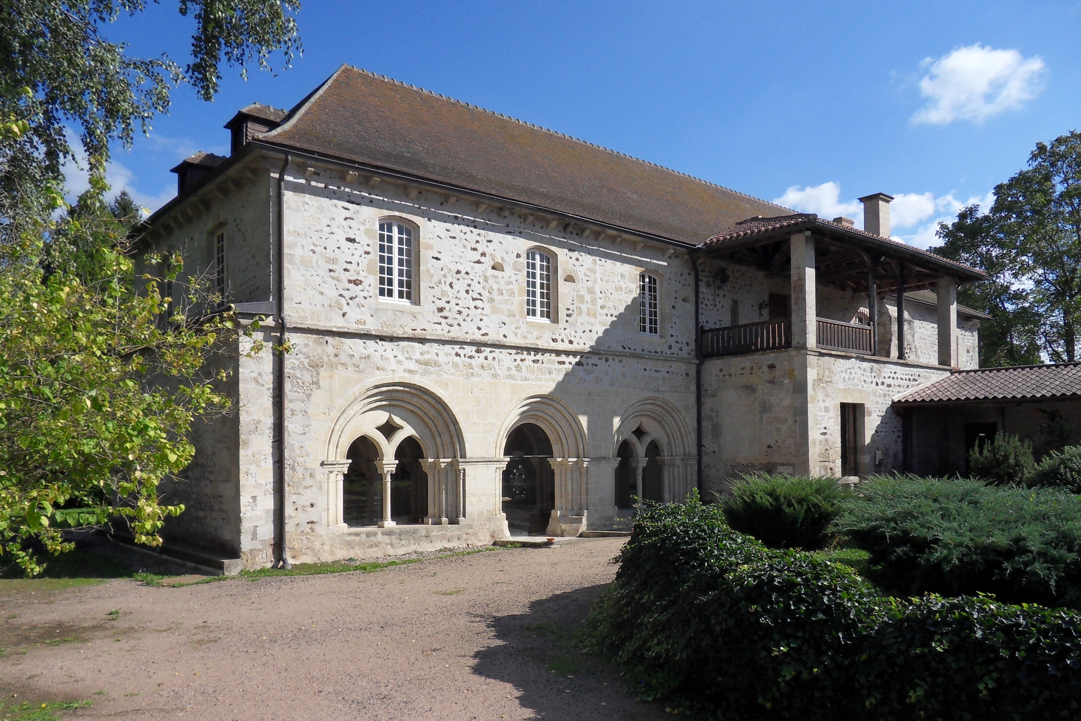 Abbaye Saint-Gilbert, (ClasséInscrit, 19692001)